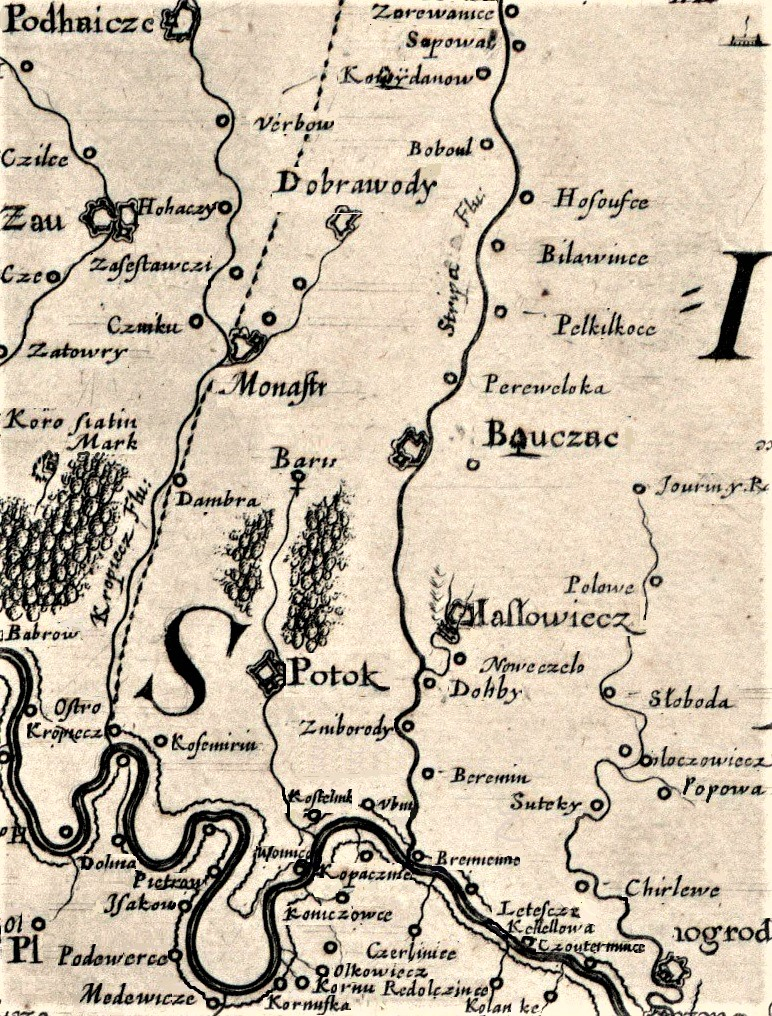 Фрагмент Спеціальної мапи України Гійома Левассера де Боплана, 1650. Бучаччина.